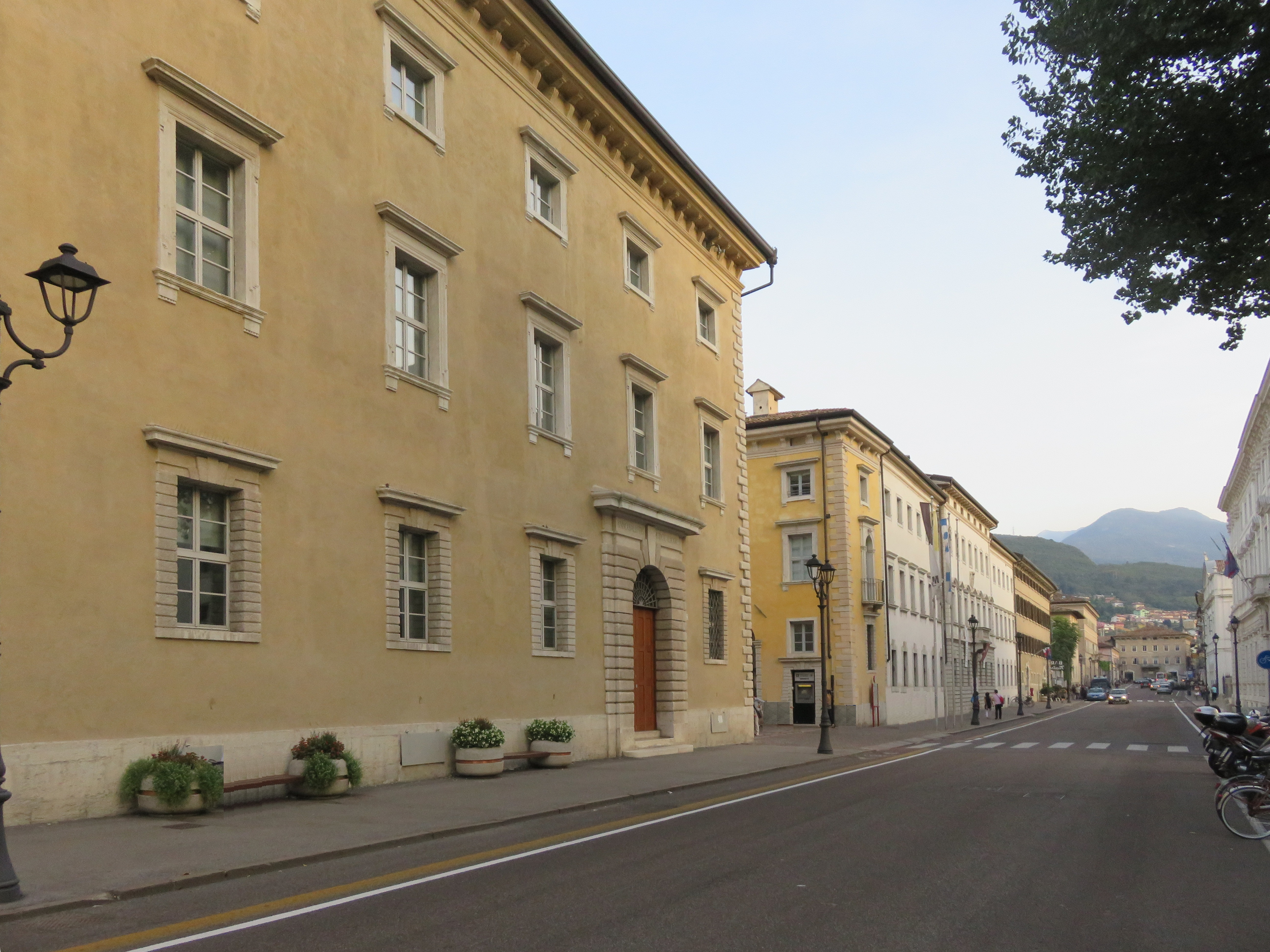 Palazzo Annona e Palazzo Alberti Poja da Corso Bettini. Il passaggio tra i due è l'accesso al Mart